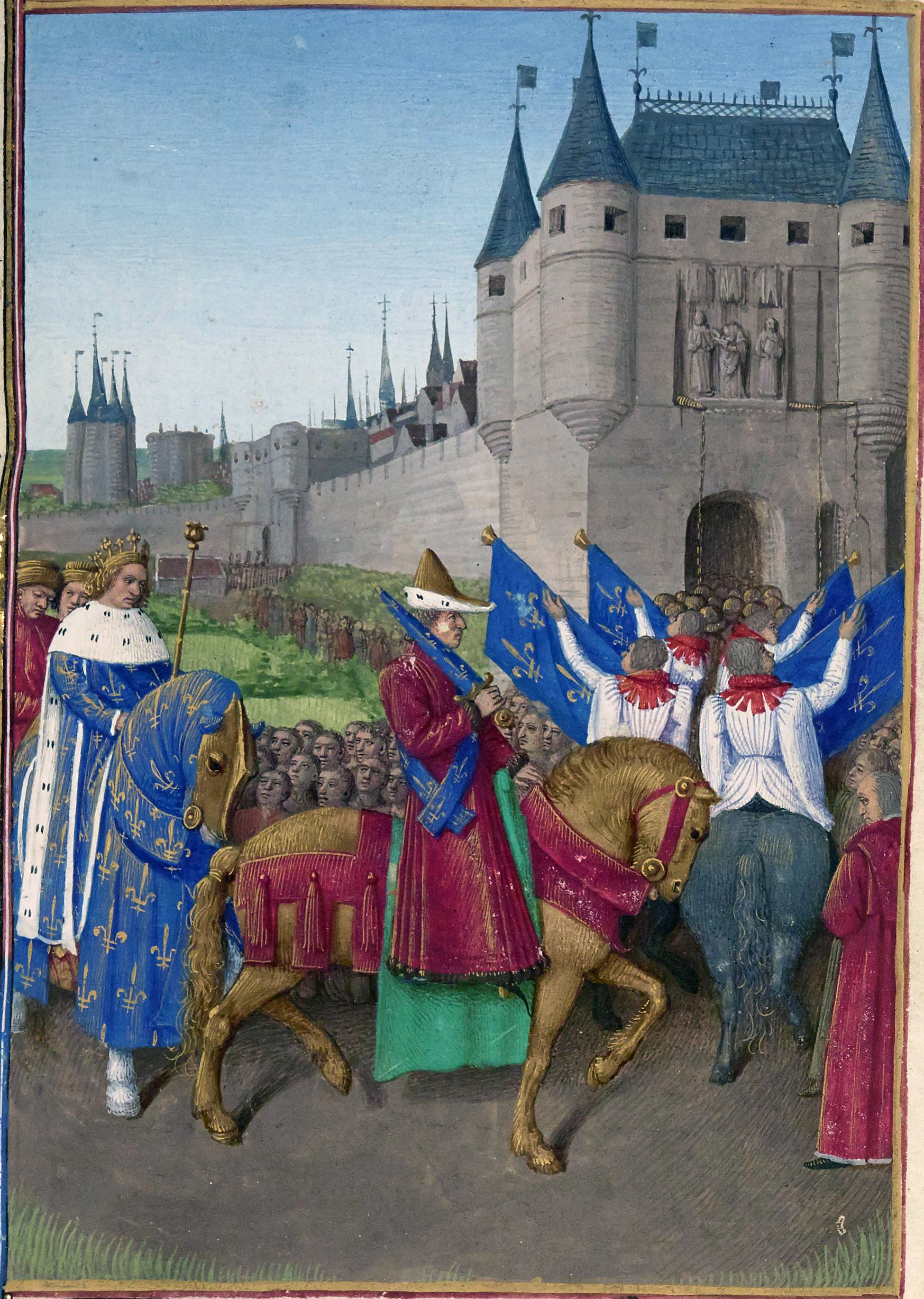 Entrée de Charles V à Paris Grandes Chroniques de France, enluminées par Jean Fouquet, Tours, vers 1455-1460 Paris, BnF, département des Manuscrits, Français 6465, fol. 417 (Livre de Charles V) Après avoir été couronné à Reims le 19 mai 1364, Charles V le Sage entre triomphalement à Paris par la porte Saint-Denis.